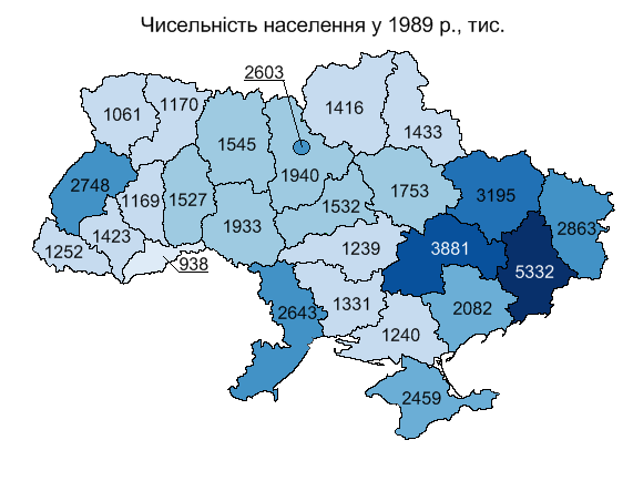 Населення регіонів Української РСР у 1989 р., тис. / Population of ukrainian regions in 1989